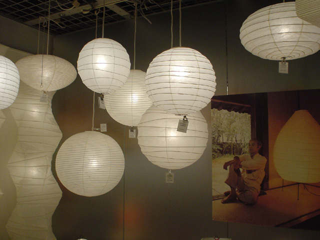 電気店の店頭で市販されるja:イサム・ノグチの「あかり（Akari）」シリーズ 写真撮影：Fluffy_nns 撮影場所：ヤマギワリビナ秋葉原店 撮影年月日：2005年5月12日 著作権：放棄します